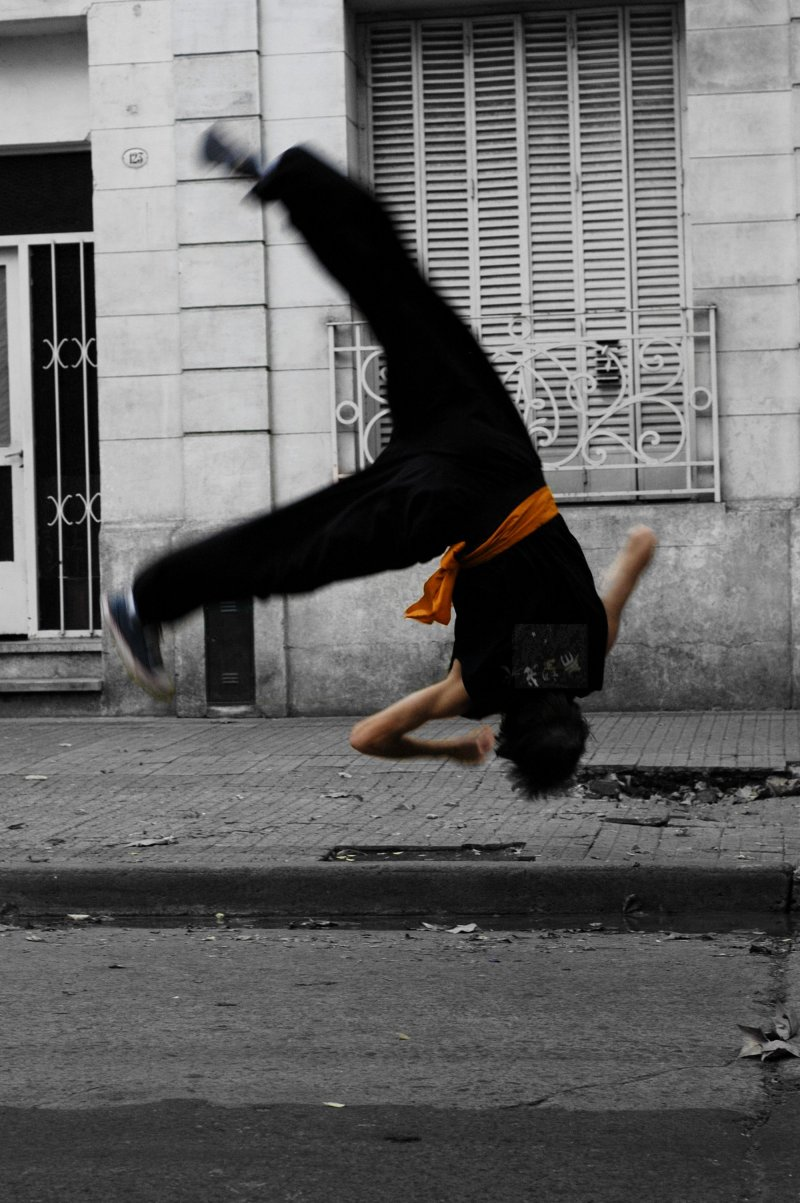 A man doing cekongfan (侧空翻; "side somersault").